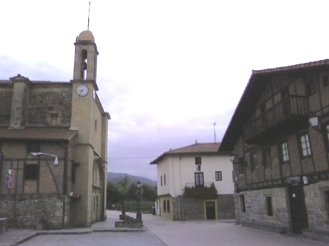 Barrio de Zubieta, en San Sebastián (España)